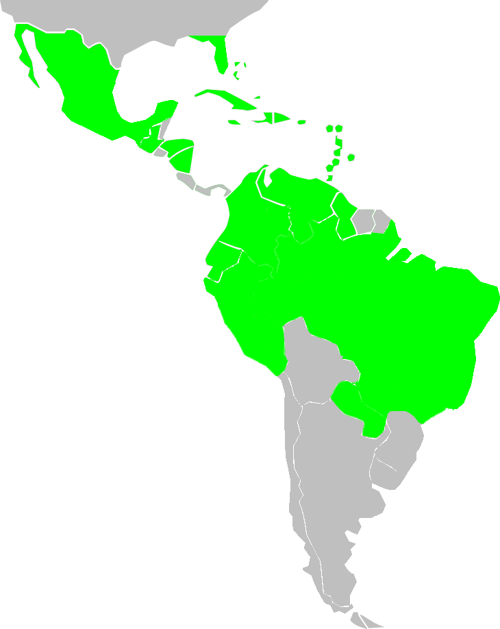 Verbreitungsgebier von Pilosocereus Quelle: Daniela C. Zappi: Pilosocereus (Cactaceae): The Genus in Brazil. Balogh Scientific Books 1994, S. 26